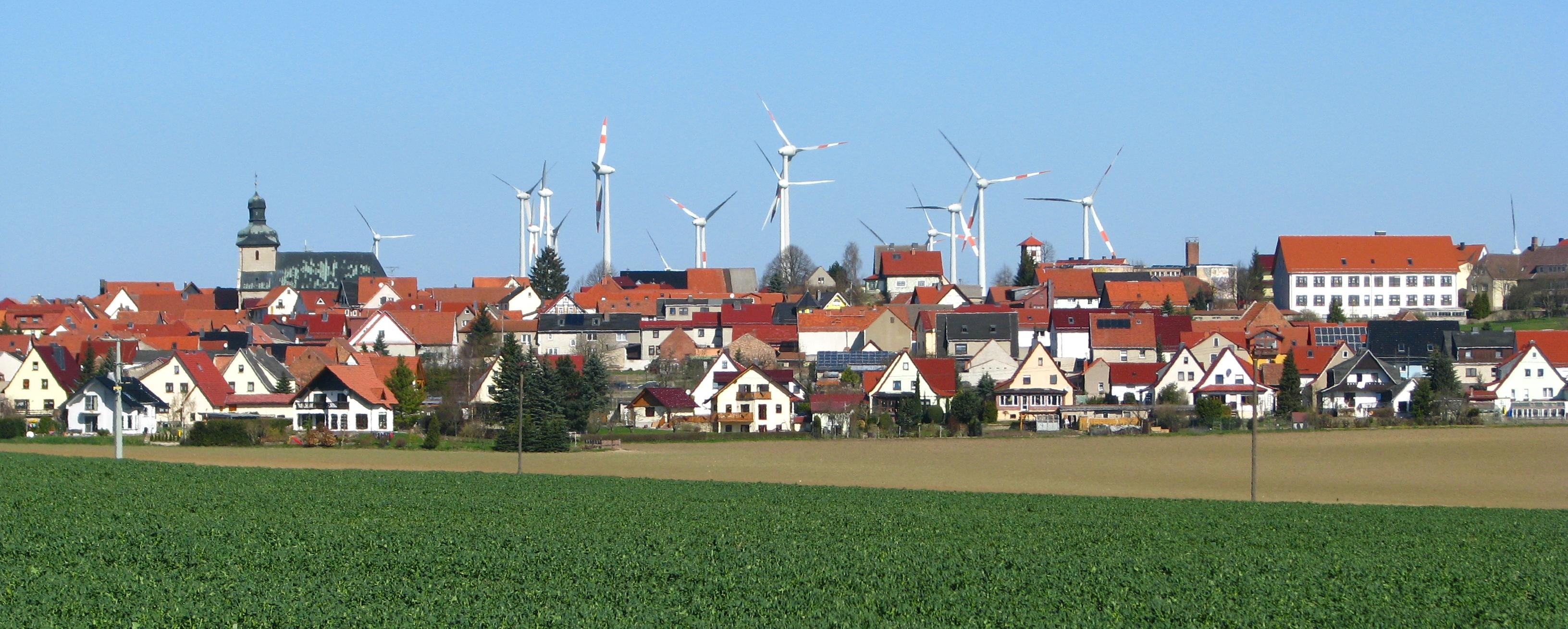 Struth von Südosten aus gesehen. Mit Jakobuskirche, Windrotorenpark und Schule.